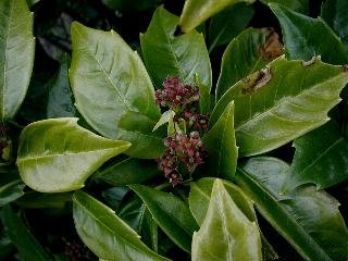 Aucuba japonica